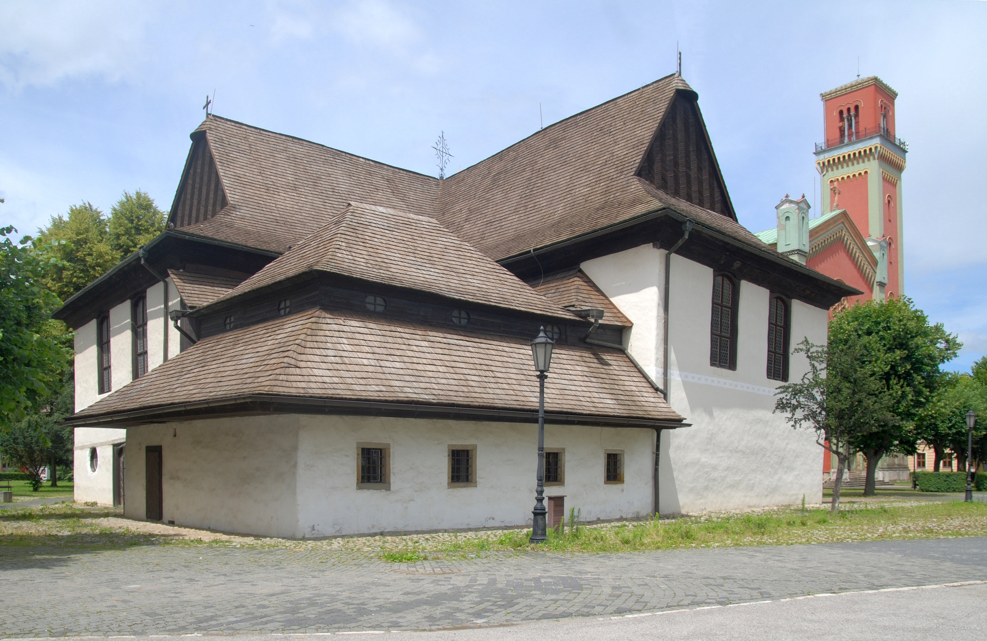 miasto Kežmarok